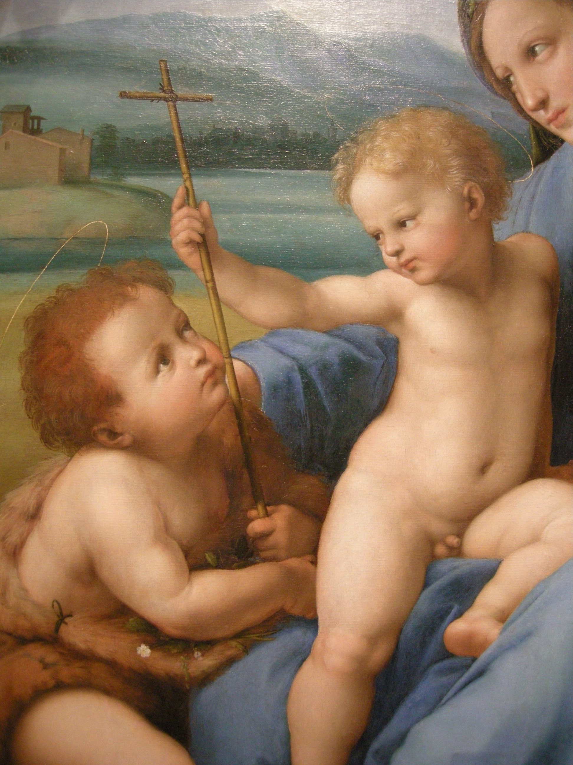 Raffaello, madonna d'alba, 1510 circa